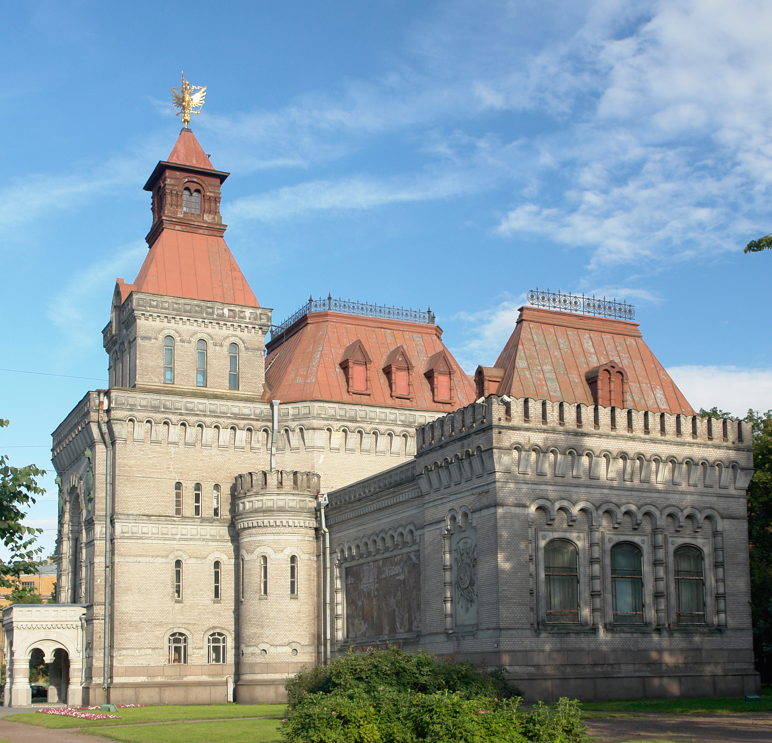 Музей Суворова (Кирочная ул., Санкт-Петербург, Россия)